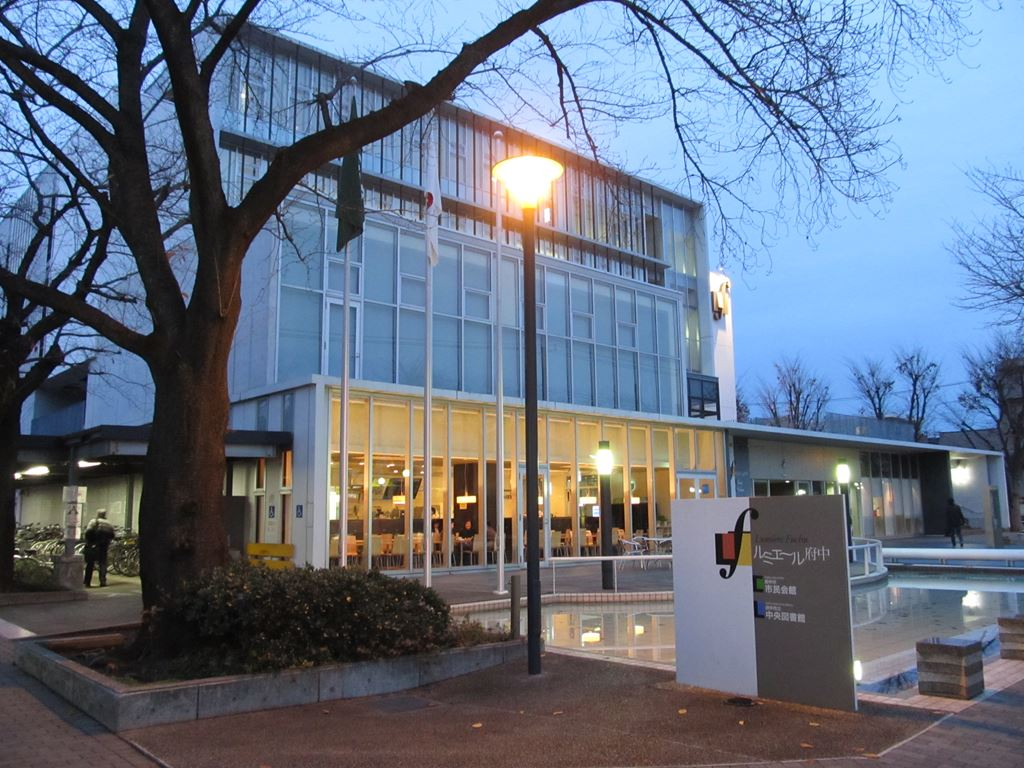 東京都府中市 Fuchu-city, Tokyo